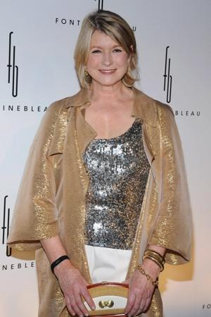 Martha Helen Stewart